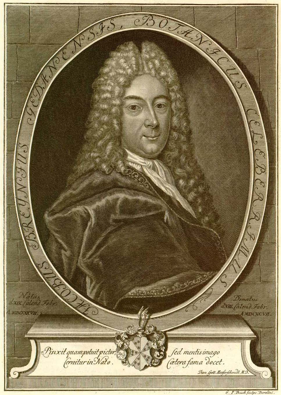 Jakob Breyne, Abbildung in Prodromi fasciculi rariorum plantarum primus et secundus, 1739